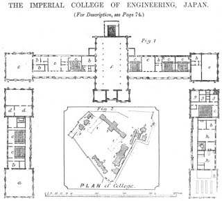 Imperial College of Engineering, The Engineering, 1877.